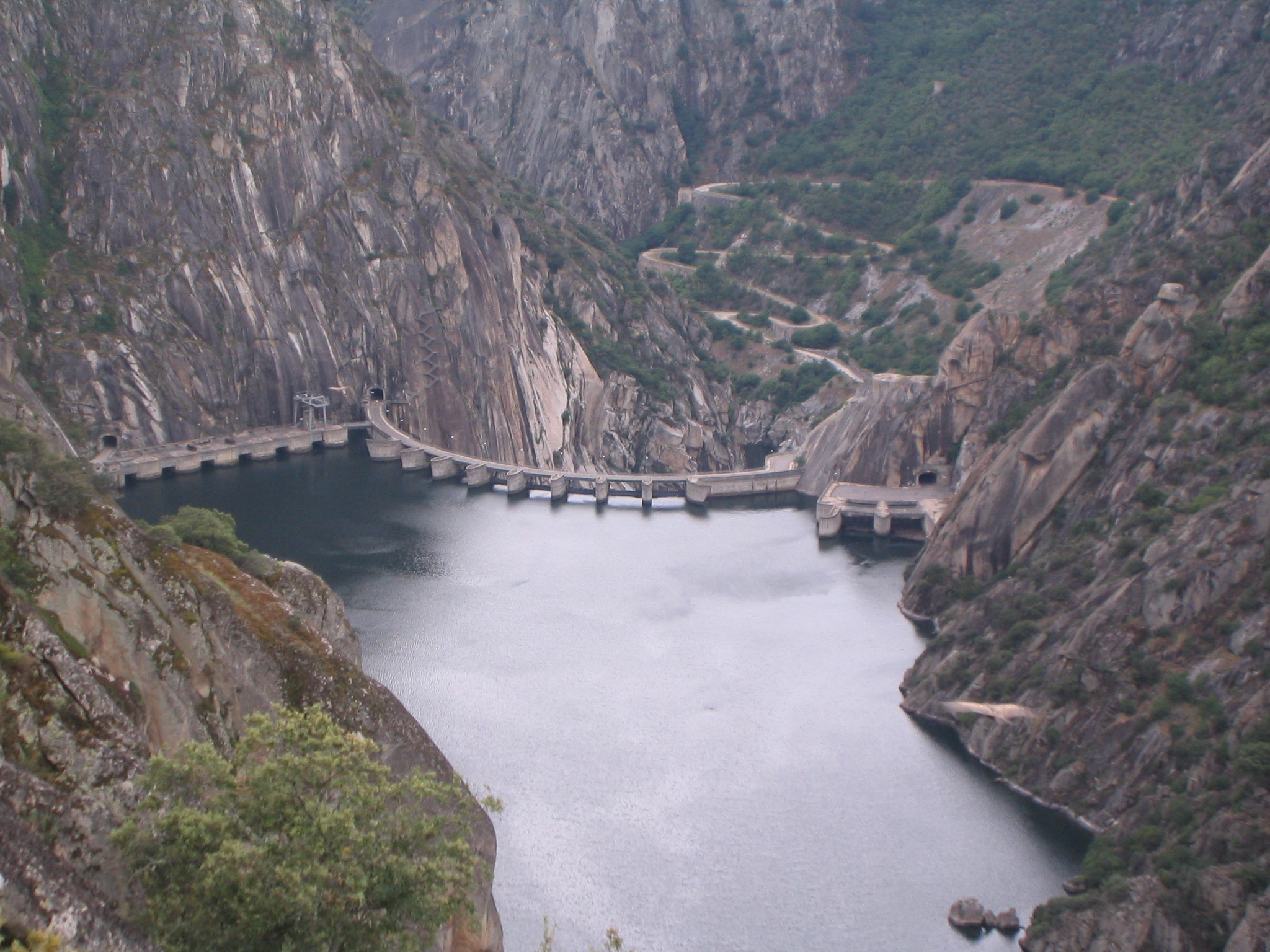 Vista de la presa de Aldeadávíla en los Arribes del Duero desde la ribera española.